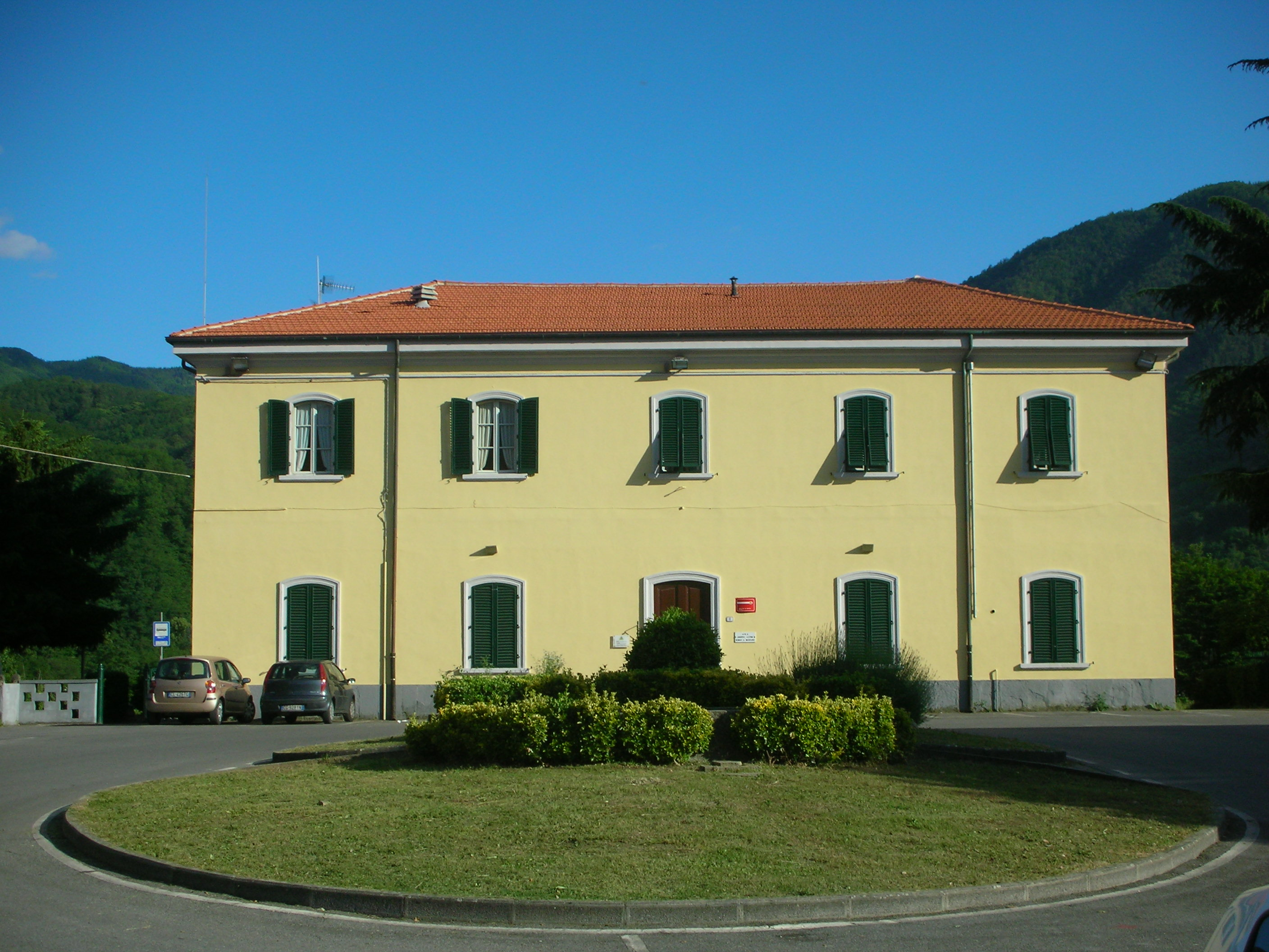 Lato campagna della stazione ferroviaria di Borgo a Mozzano